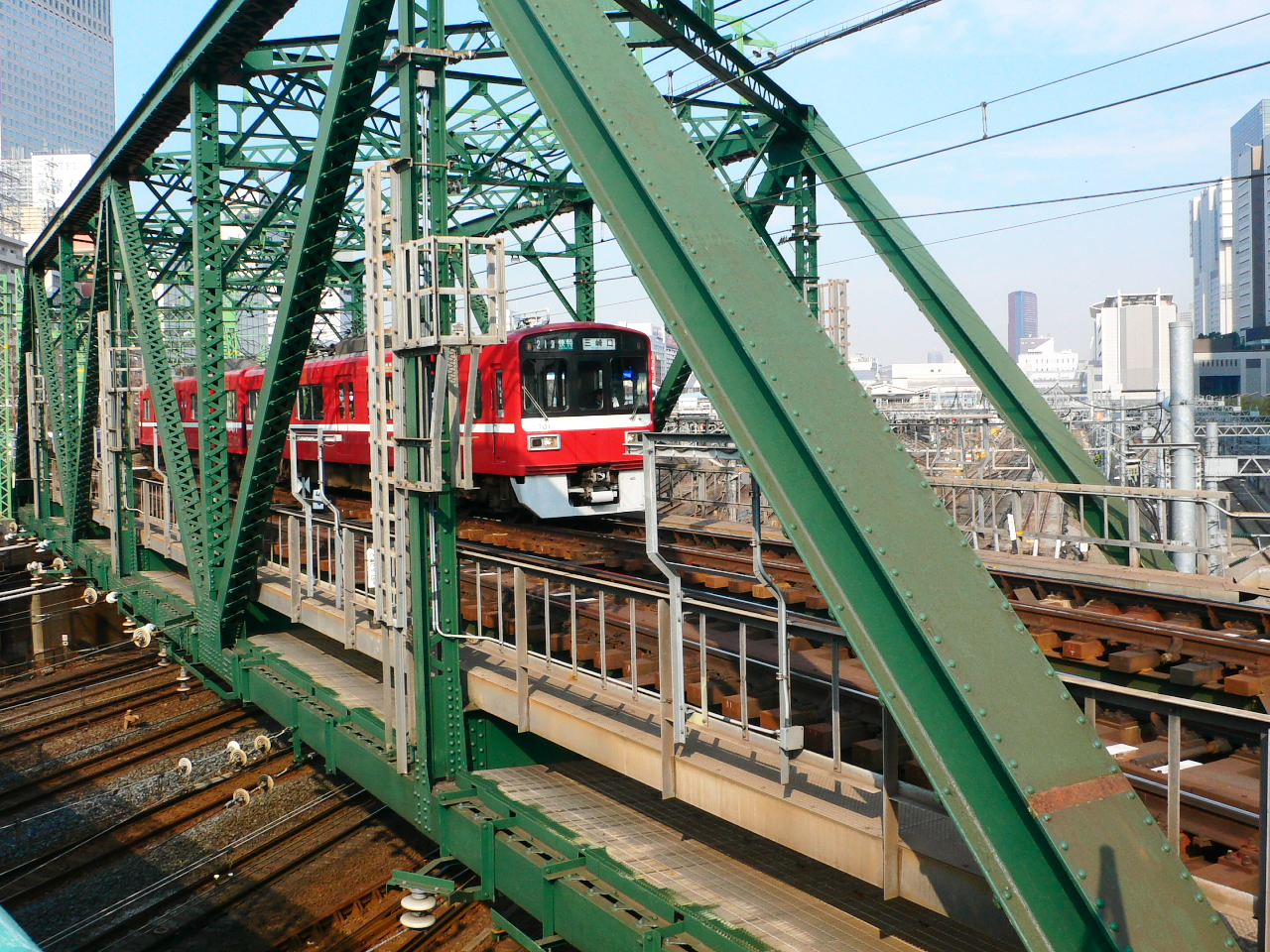 Yatsuyama bridge, shinagawa.